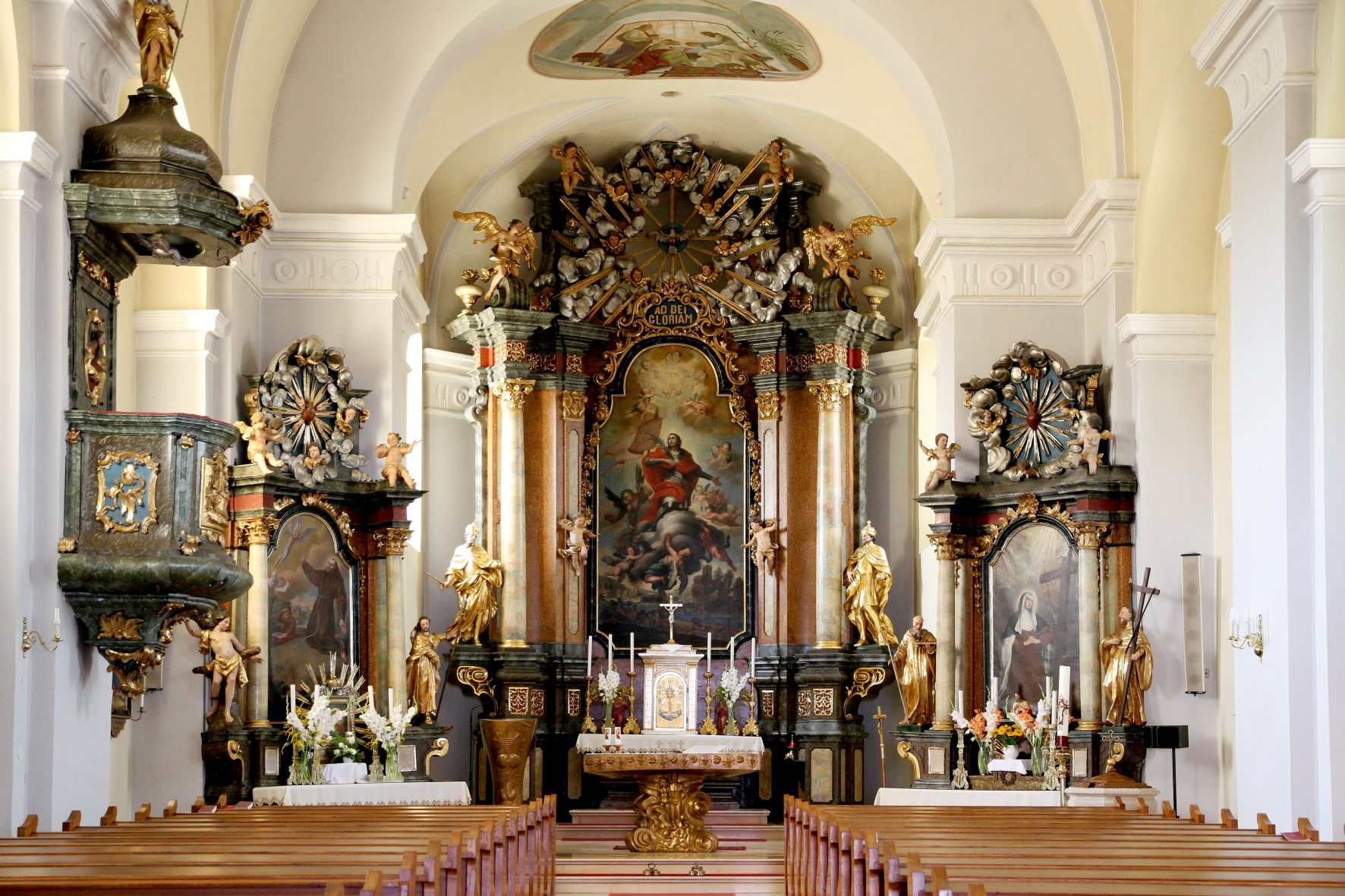 Innenansicht der kath. Pfarrkirche hl. Florian in der burgenländischen Gemeinde Winden am See.